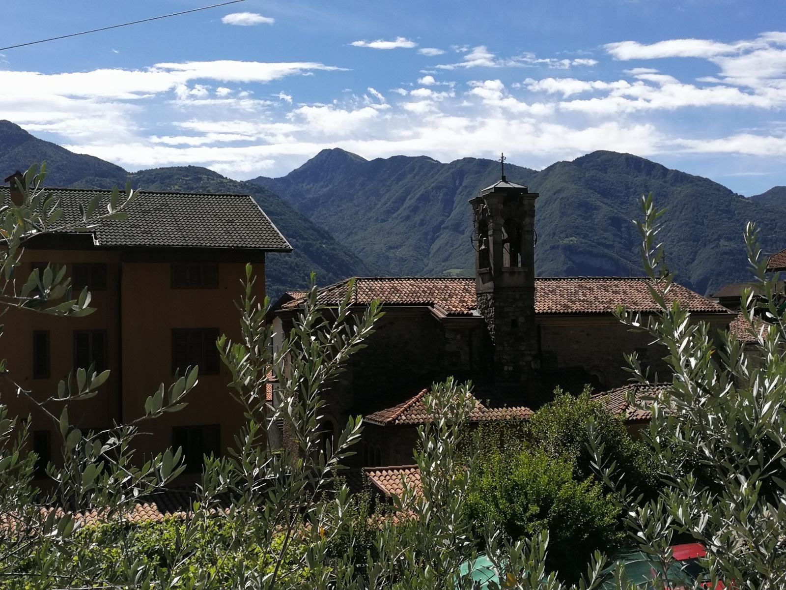 Chiesa di San Rocco di Corti (Costa Volpino)